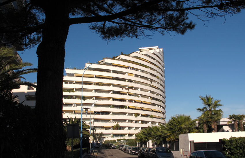 Marina Baie des Anges, Villeneuve-Loubet, Alpes-Maritimes, France